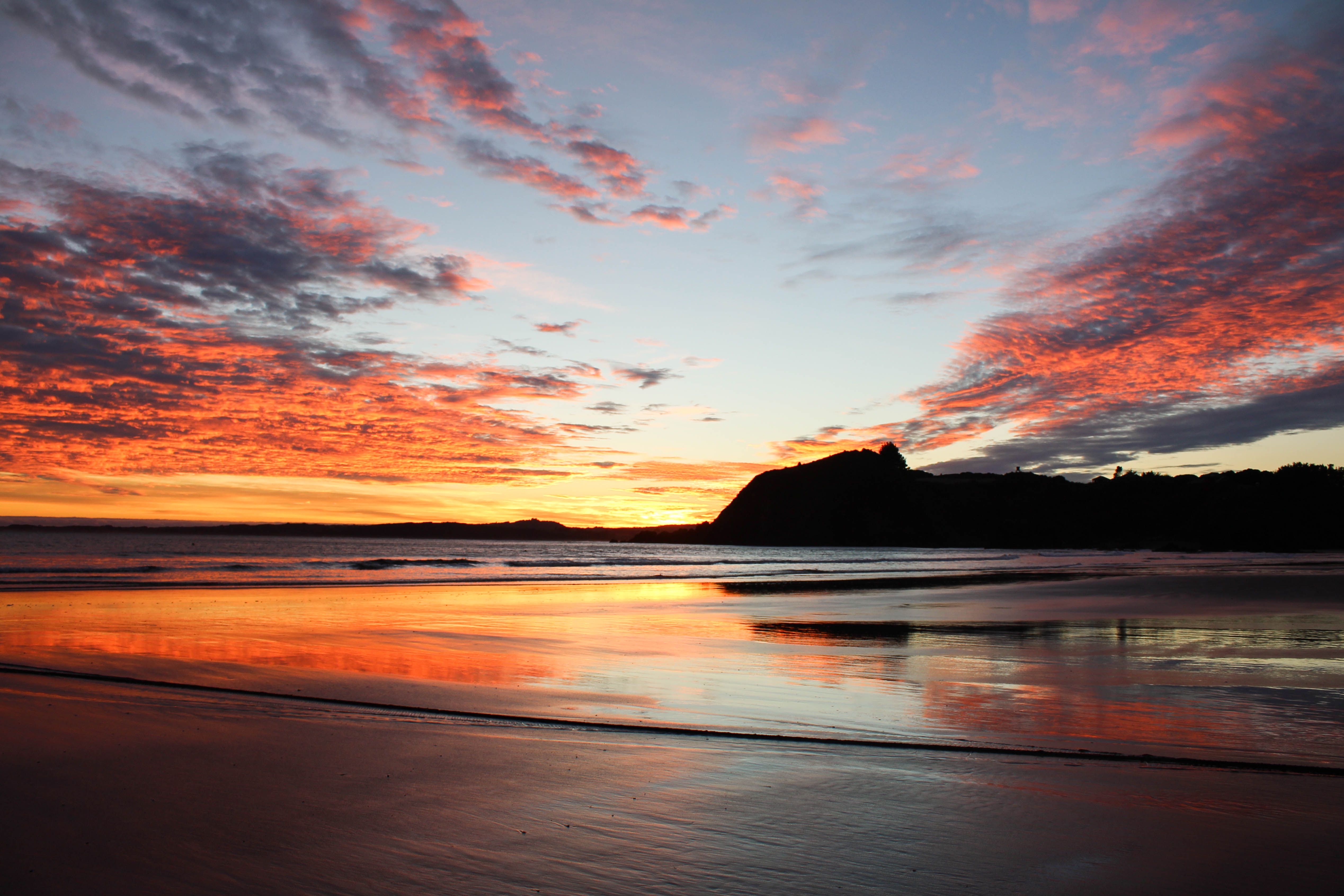 Amanecer en el Monumento Natural Islotes de Puñihuil. Región de Los Lagos, Chile.